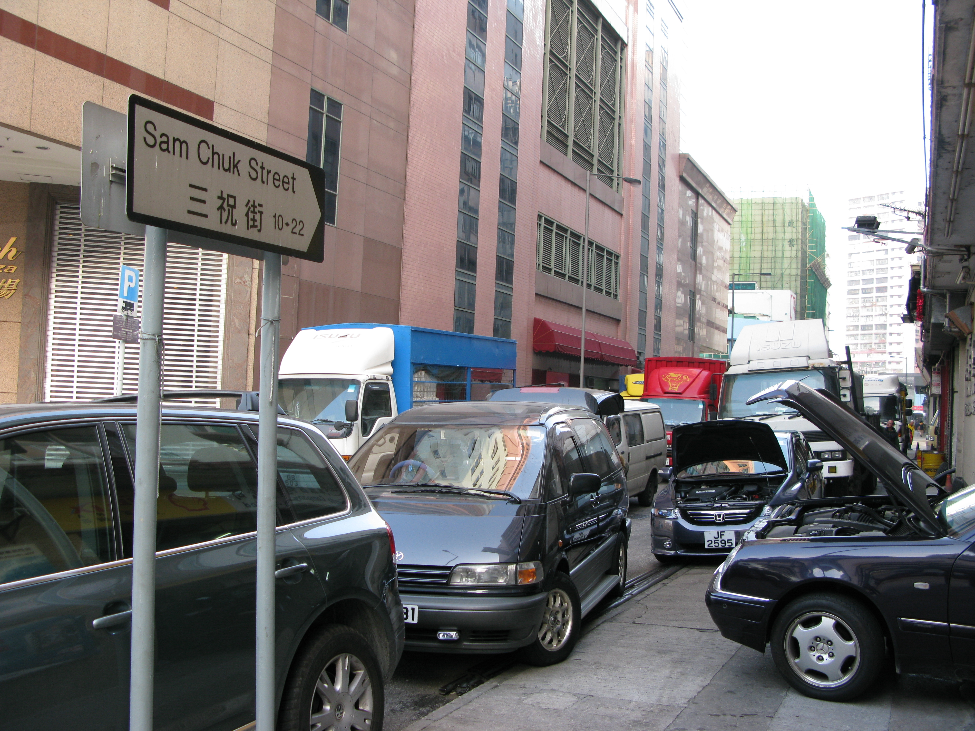 中文（香港）: 香港九龍新蒲崗三祝街